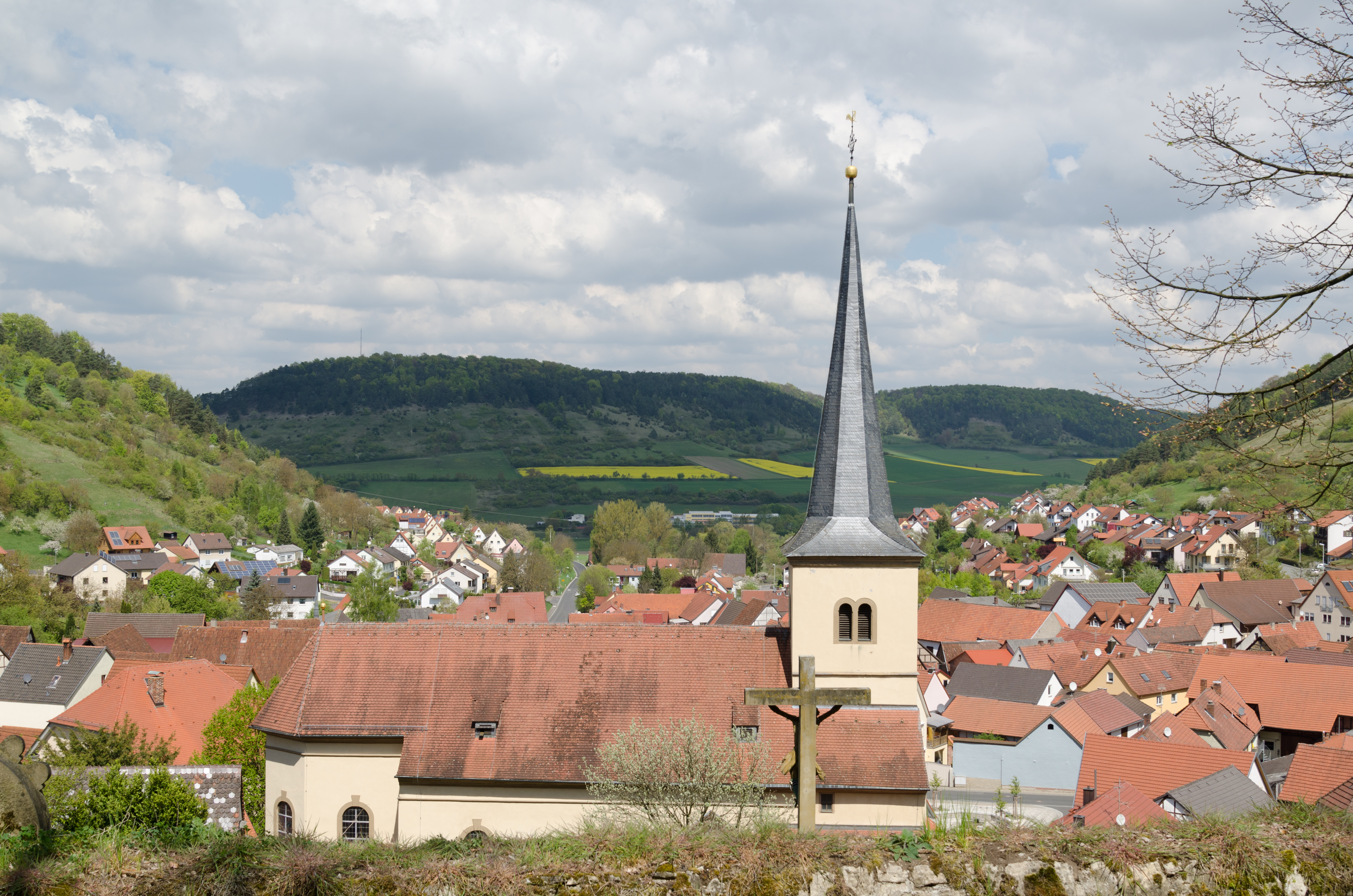 Sulzthal, Pfarrkirche von Südwesten